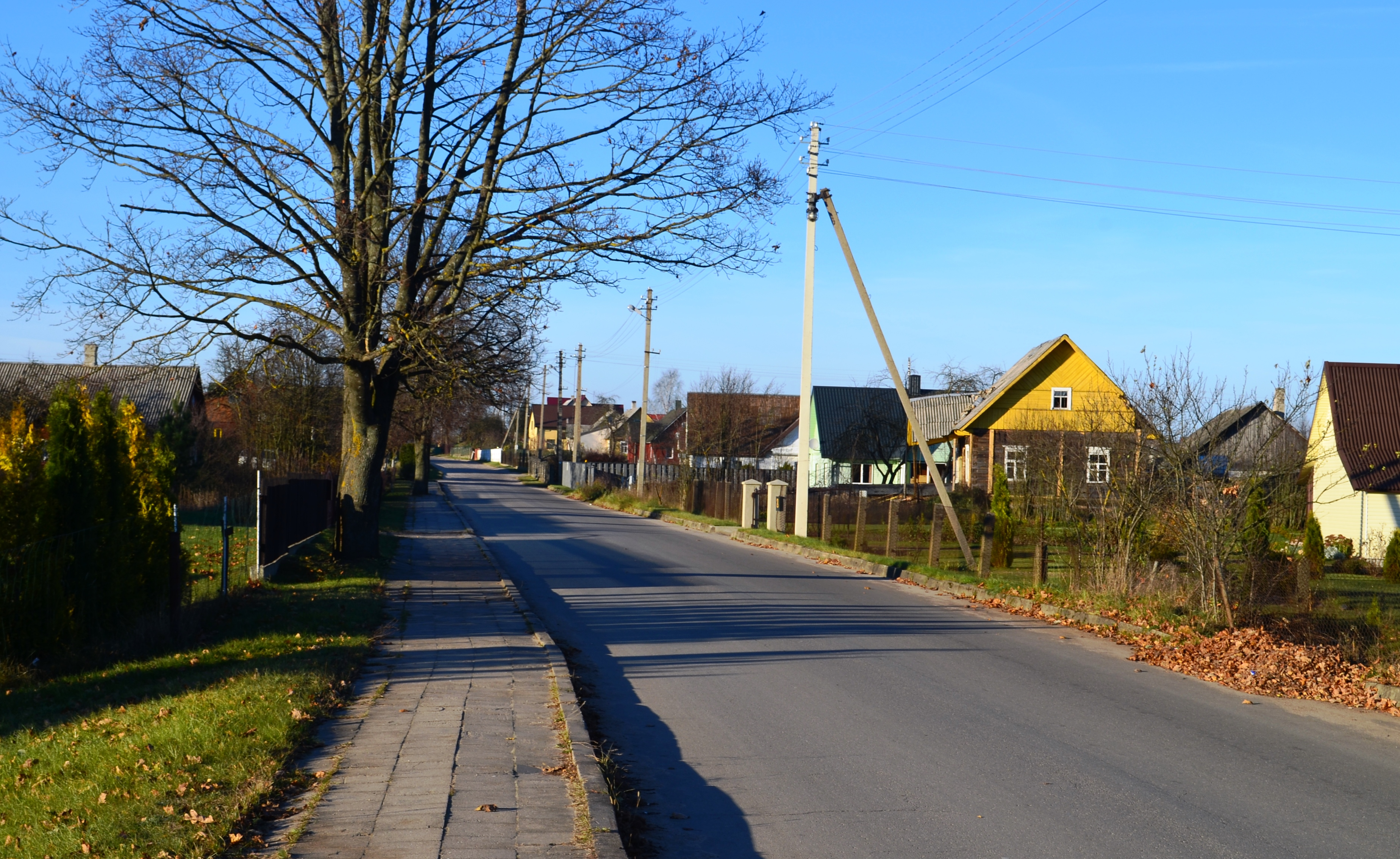 Užupio g., Mickūnai, Vilniaus raj.